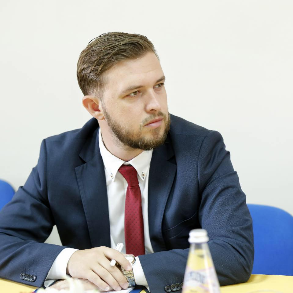 Erion Malaj takim ne Universitetin e Vlores